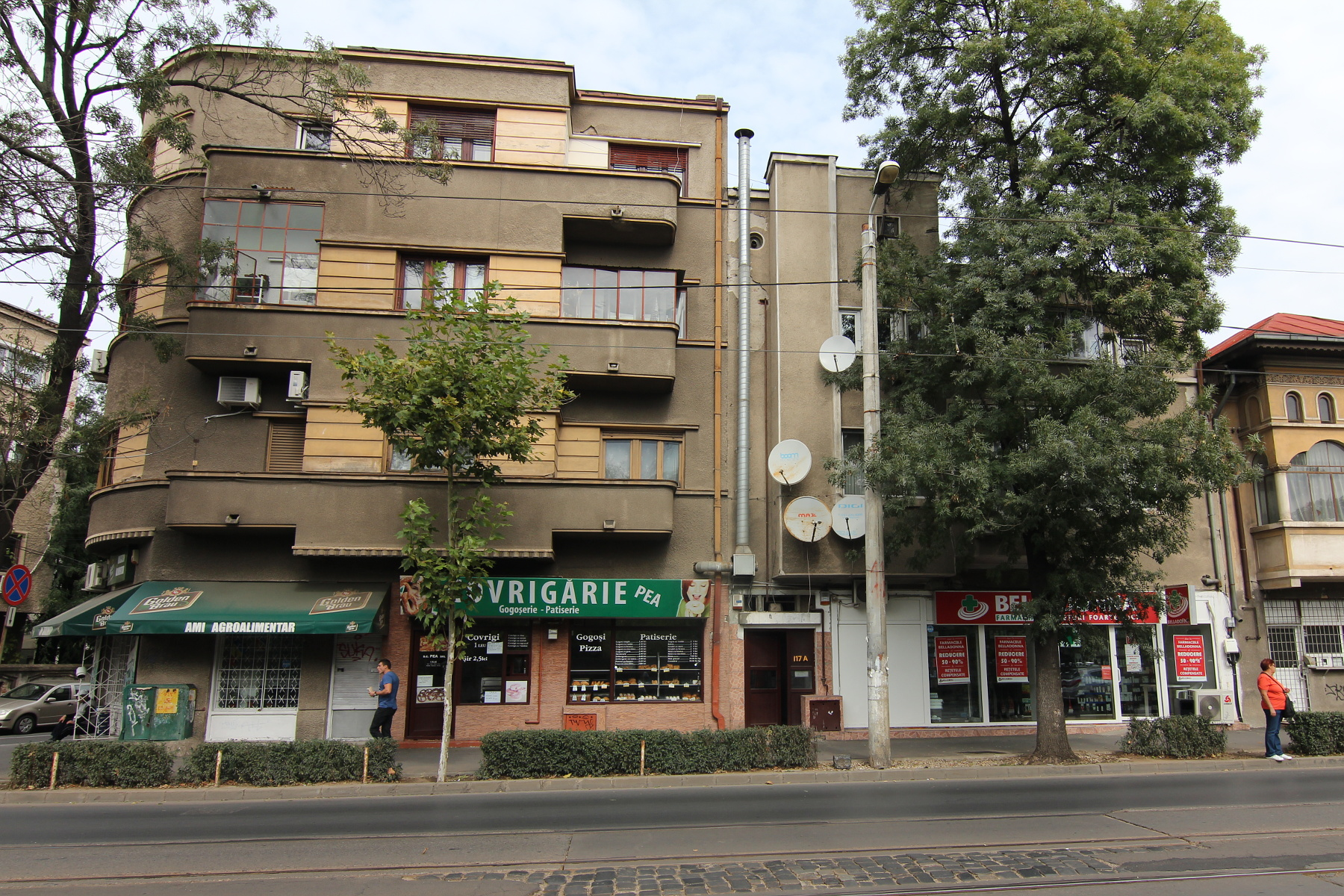 Casă pe Dudești